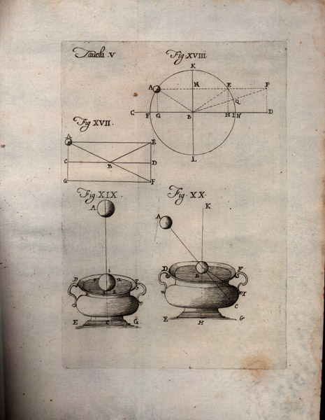 Tavola 5